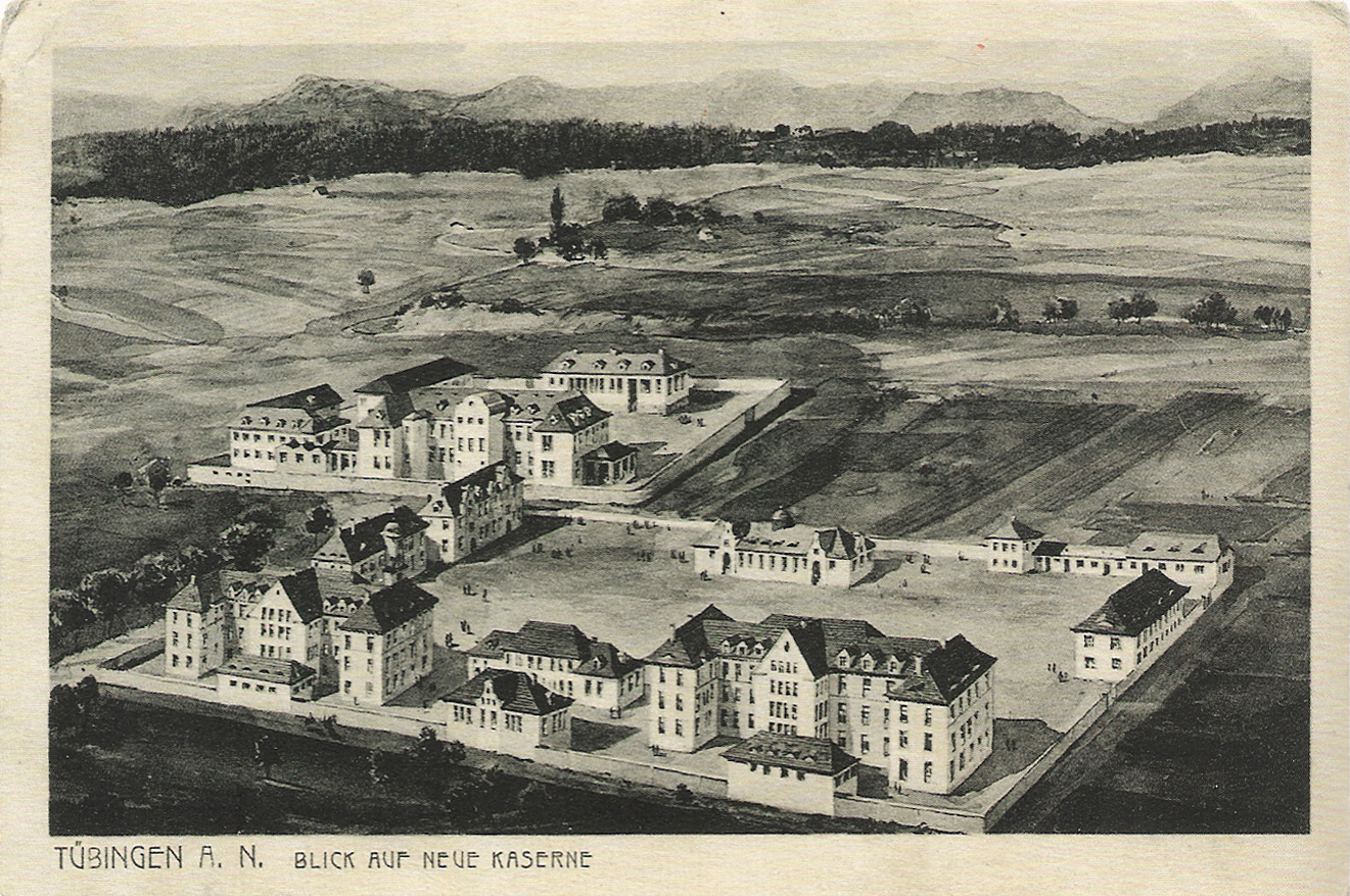 Blick_auf_die „Neue_Kaserne“ (später Loretto-Kaserne genannt) vom Nordwesten mit der Schwäbischen Alb im Hintergrund. Die Zufahrt zu der 1916 fertiggestellten Kaserne ist von der links davon verlaufenden Paulinenstraße. Hinter der eigentlichen Kaserne liegt, abgetrennt durch die heutige Stuttgarter Straße, das Garnisonslazarett. (Gezeichnete Postkarte)